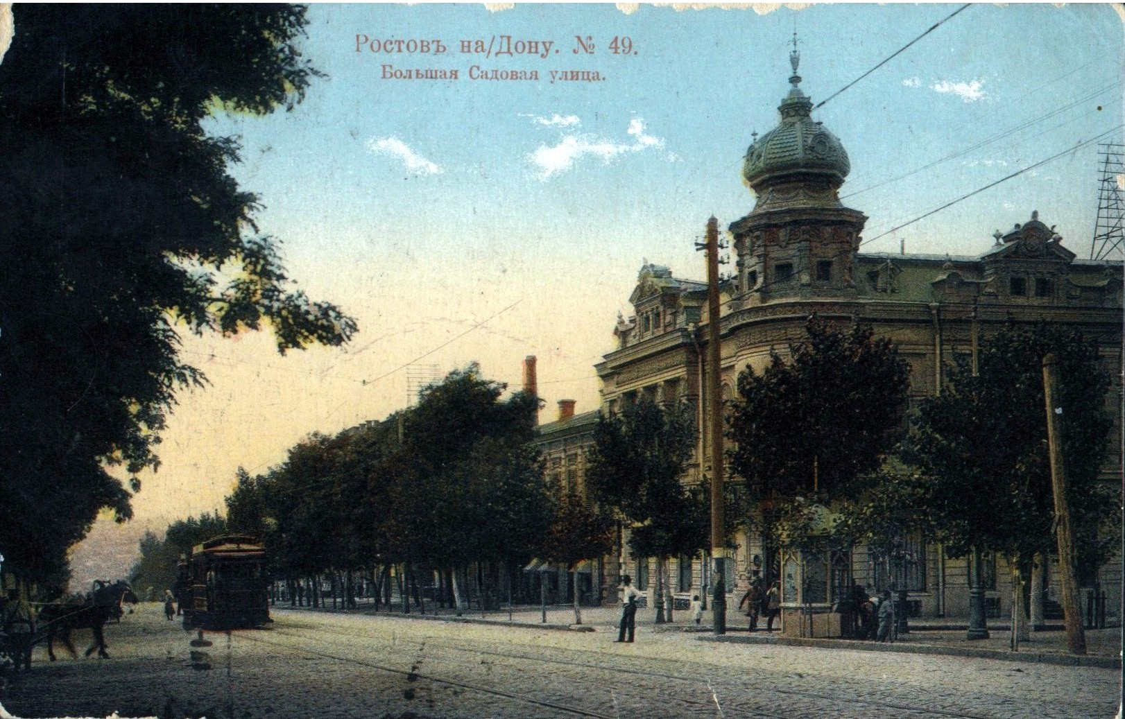 Большая Садовая улица в Ростове-на-Дону. Дореволюционная открытка.